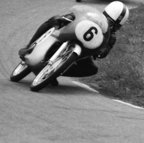 TT te Assen. De 50cc klasse. Mitsuo Itoh